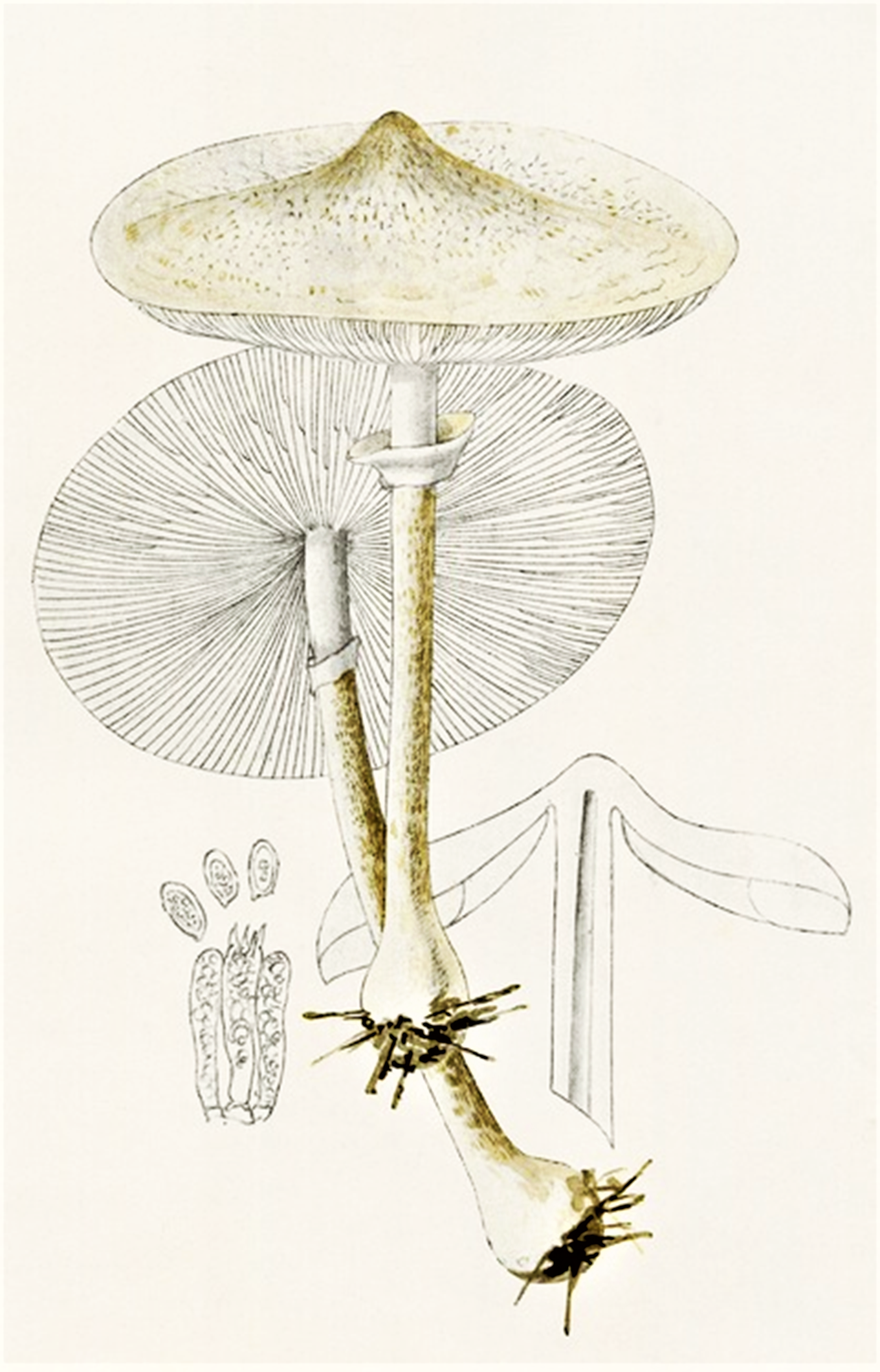 Giacomo Bresadola: Lepiota mastoidea (Fr., 1821 ex P.Kumm., 1871), heute Macrolepiota mastoidea (Fr.) Singer (1951)